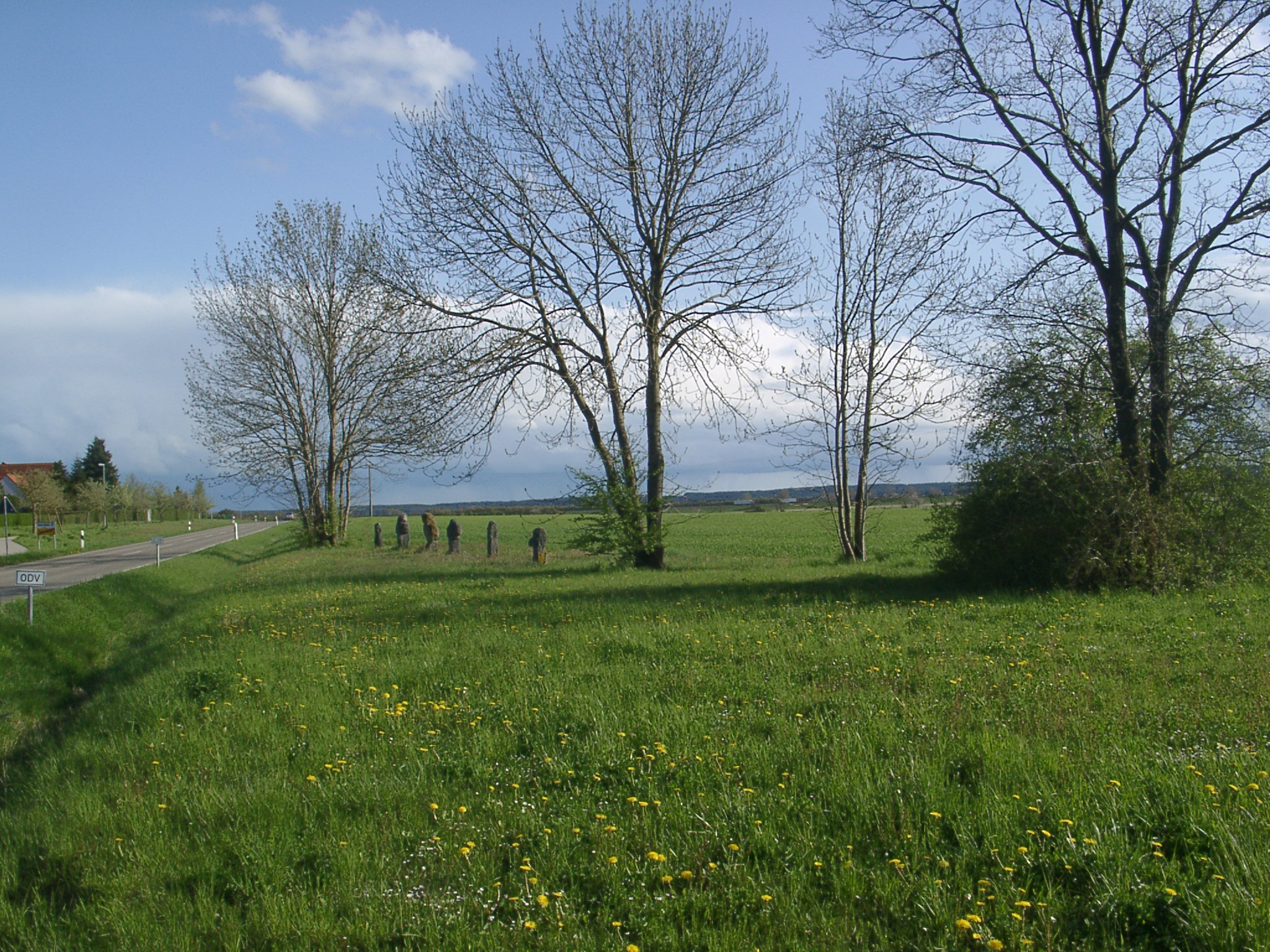 Neunstetten